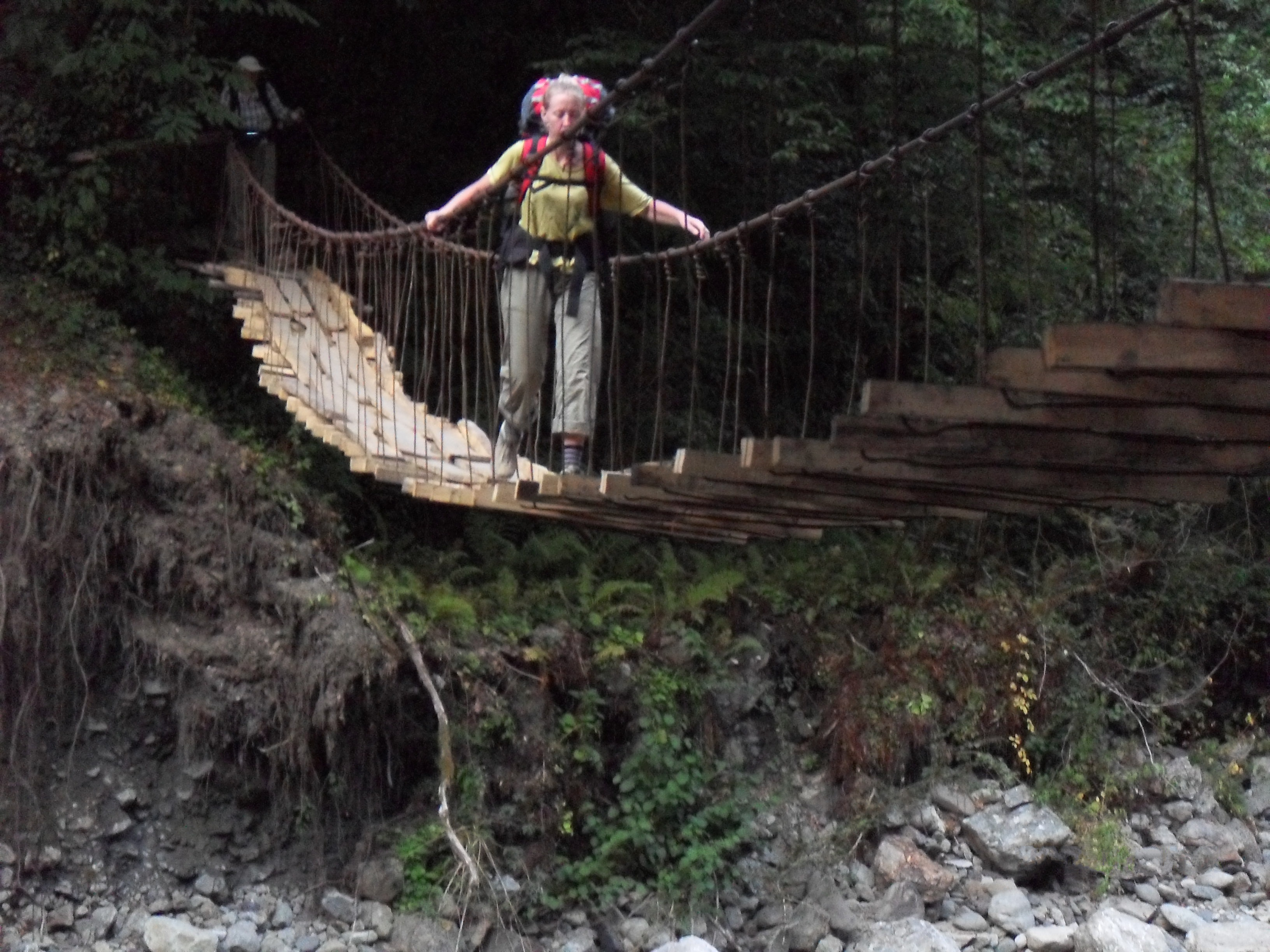 Подвесной мост через реку Шахе. Мост сокращает расстояние между кордоном и приютом в Бабук-ауле